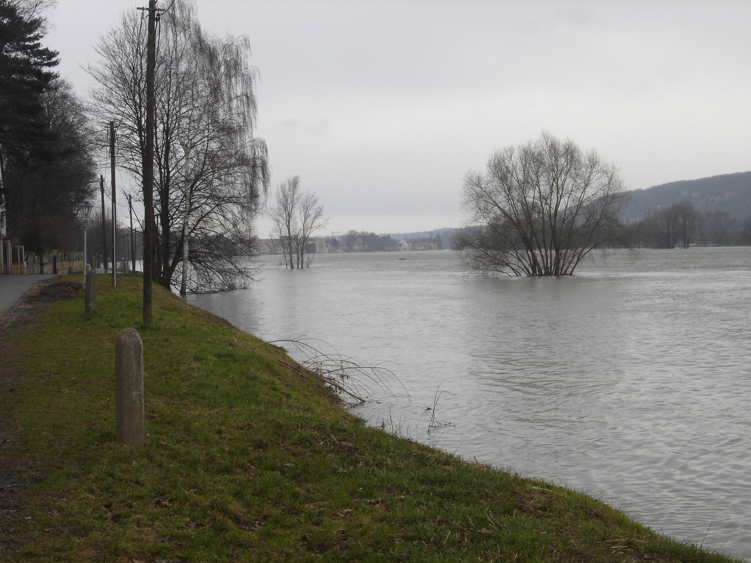 flood at the border of Kleinzschachwitz, Dresden Comparison: Normal level: Image:Elbe kleinzschachwitz 20060623 1.jpg